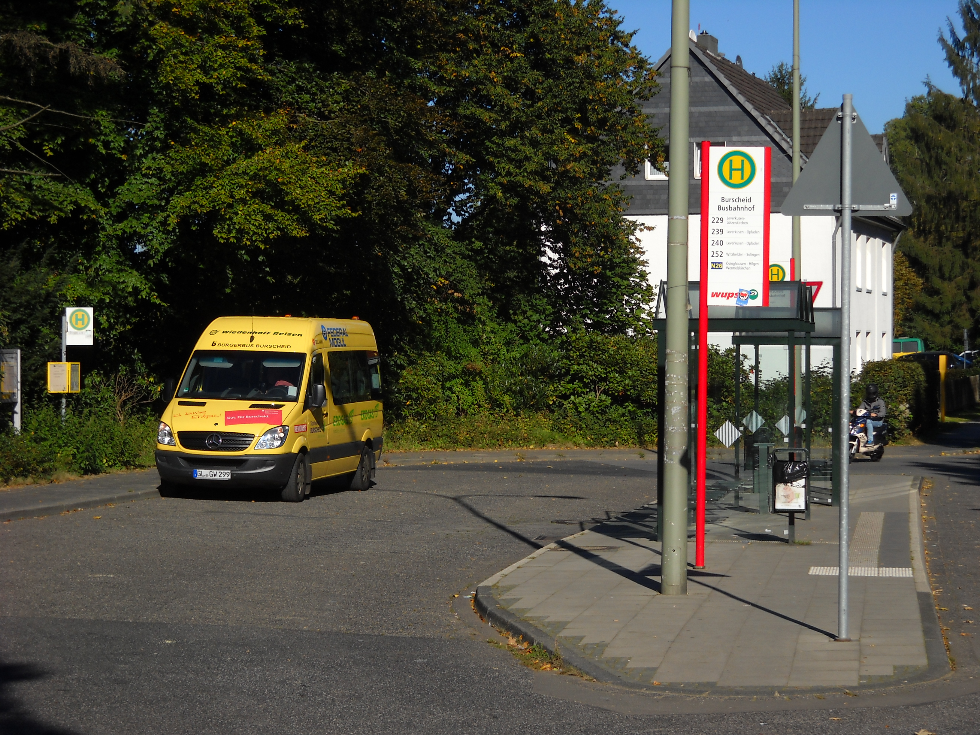 Innenstadt von Burscheid im Rheinland im September 2015.